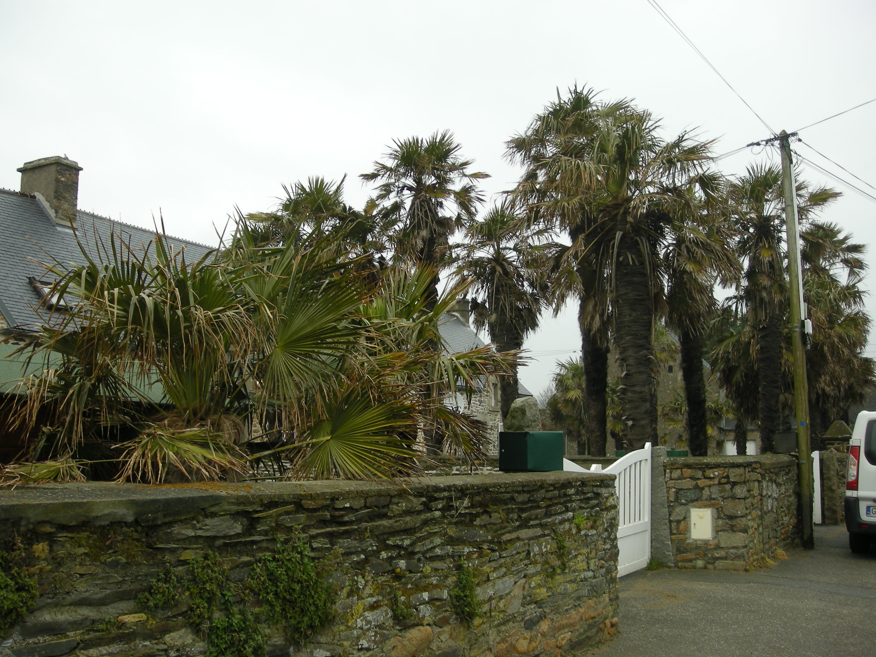 Trachycarpus fortunei au Rozel (Manche, Basse-Normandie, France).